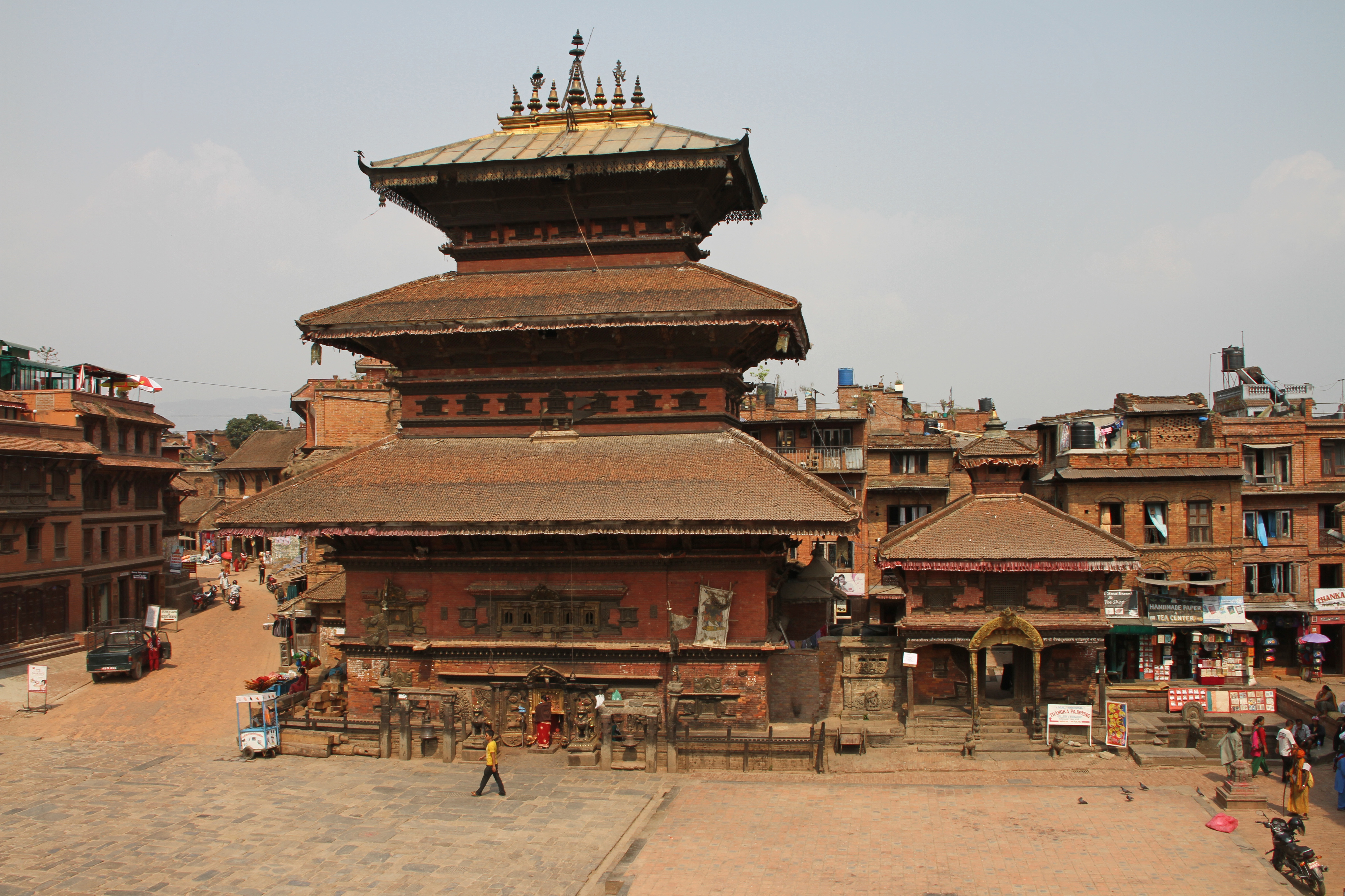 Bhaktapur, Bhairava Mandir am Taumadhi Tole